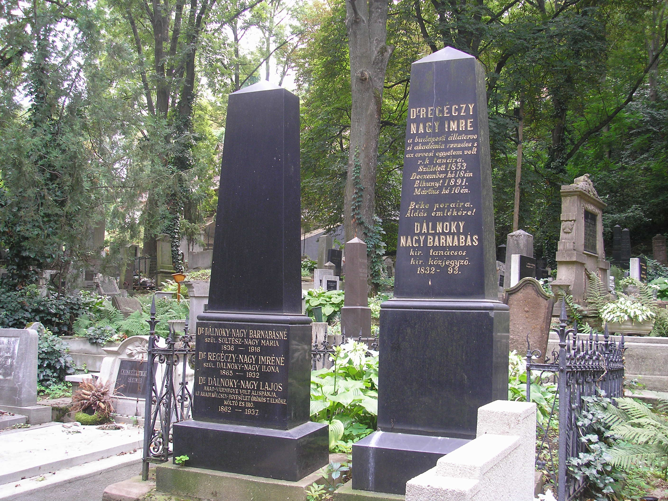 Dálnoky-Nagy Lajos Regéczy Nagy Imre síremléke (Miskolc, Avasi temető)